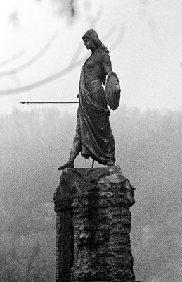 Monumento alla difesa di Casale, 1897 bronze sculpture outside the castle at Casale Monferrato of a young female warrior in Lombard costume